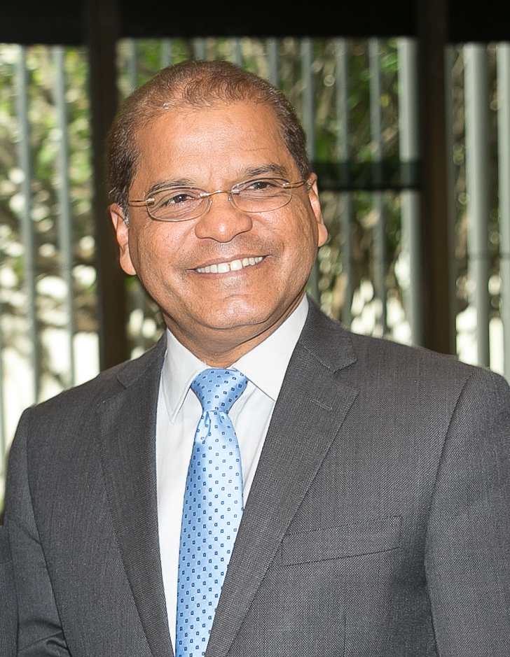 Oscar Ortiz, vicepresidente de El Salvador, junto al vicepresidente brasileño Michel Temer